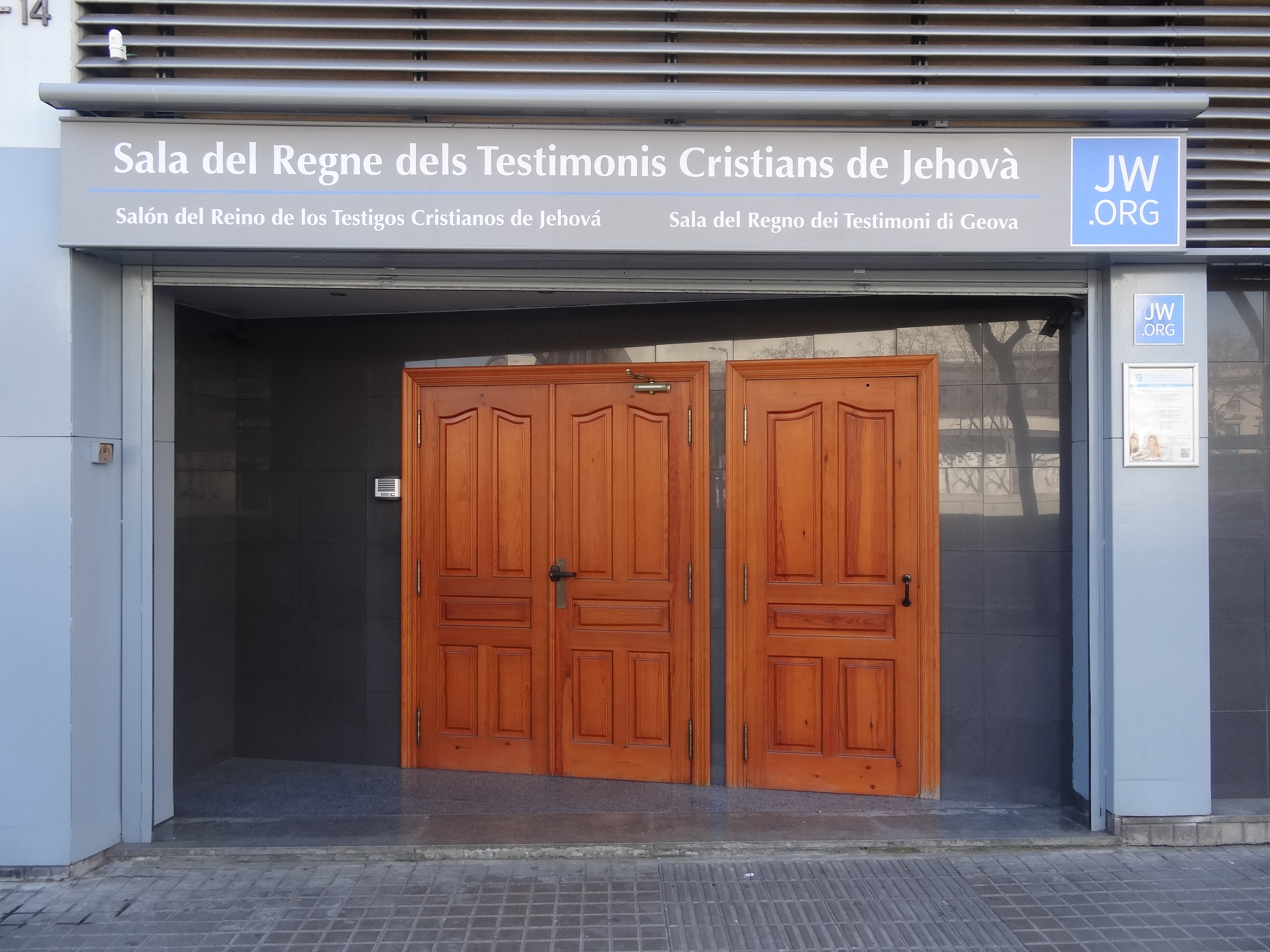 Sala del Regne dels Testimonis Cristians de Jehovà - Carrer del Doctor Aiguader, 14-16. Barcelona